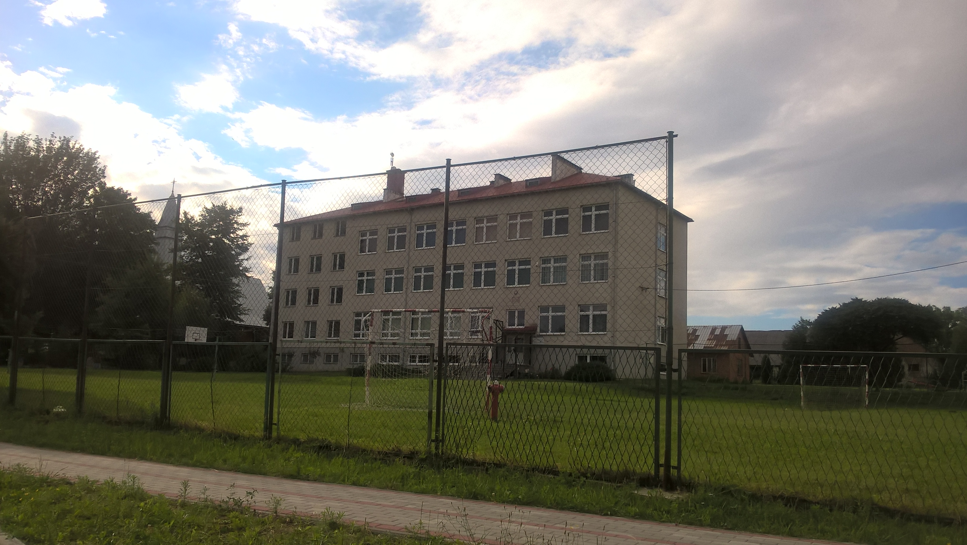 Budynek szkoły podstawowej w Różańcu